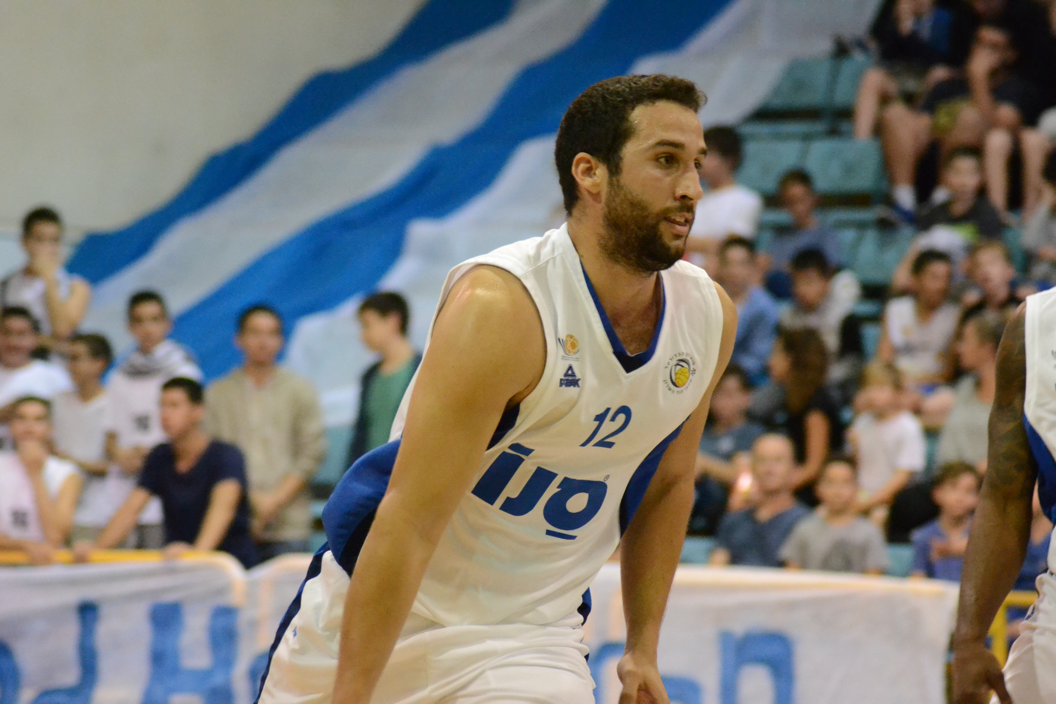 מכבי הוד השרון (בלבן) על רקע הקהל הביתי, הוד השרון, 2017